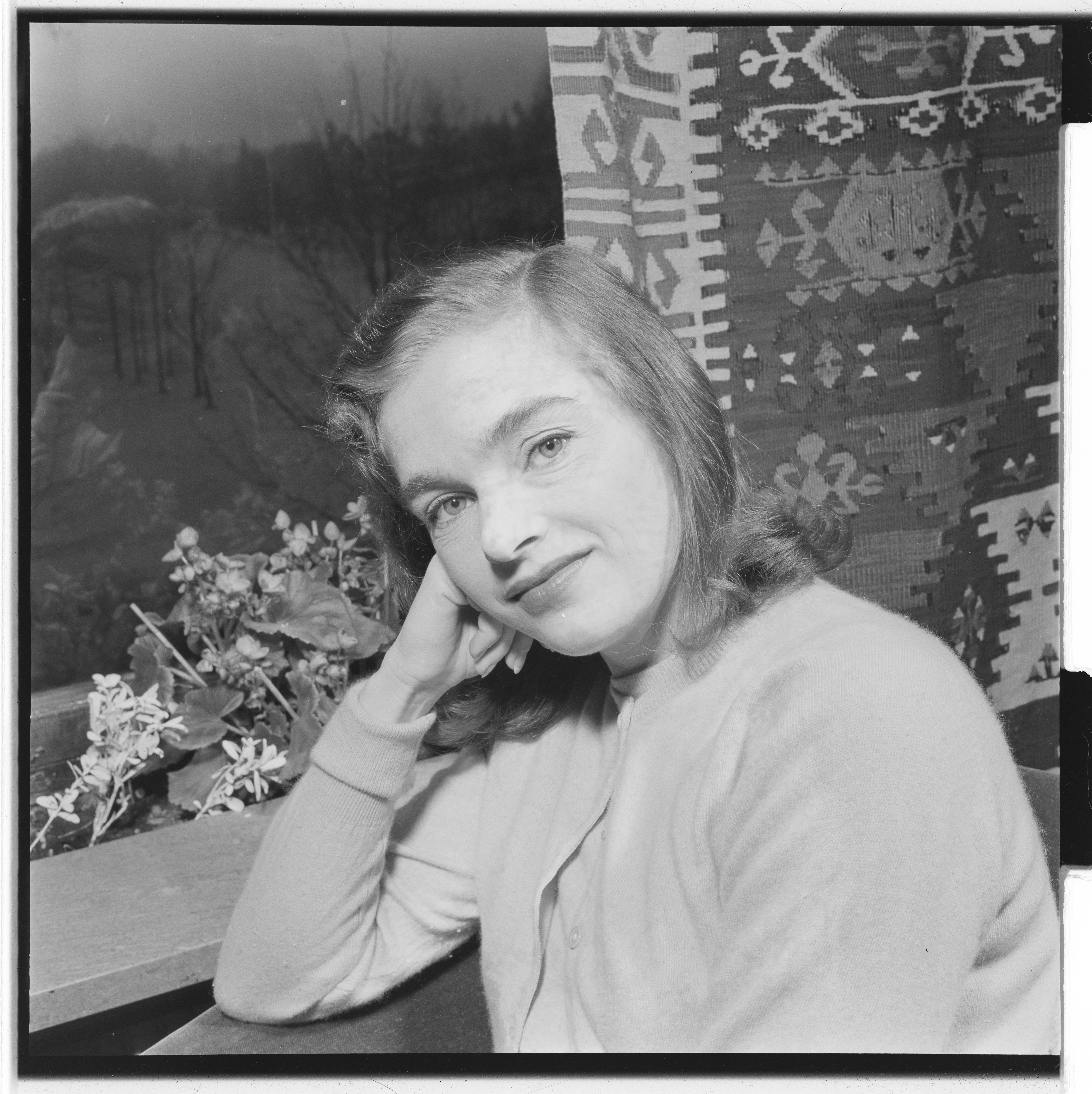 Bildet er hentet fra Arkivverket. Eva Henning, svensk skuespillerinne. NÅ nr. 2, 1954 Arkivinstitusjon : Riksarkivet Arkivnavn : Billedbladet NÅ Sted : Norge, Ukjent, Ukjent, Ukjent Emneord: Kvinner, Portretter Avbildet: Henning, Eva